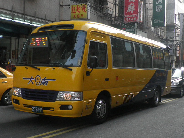 大南汽車2010年Toyota Coaster中巴278-FP行駛臺北市聯營公車216副線